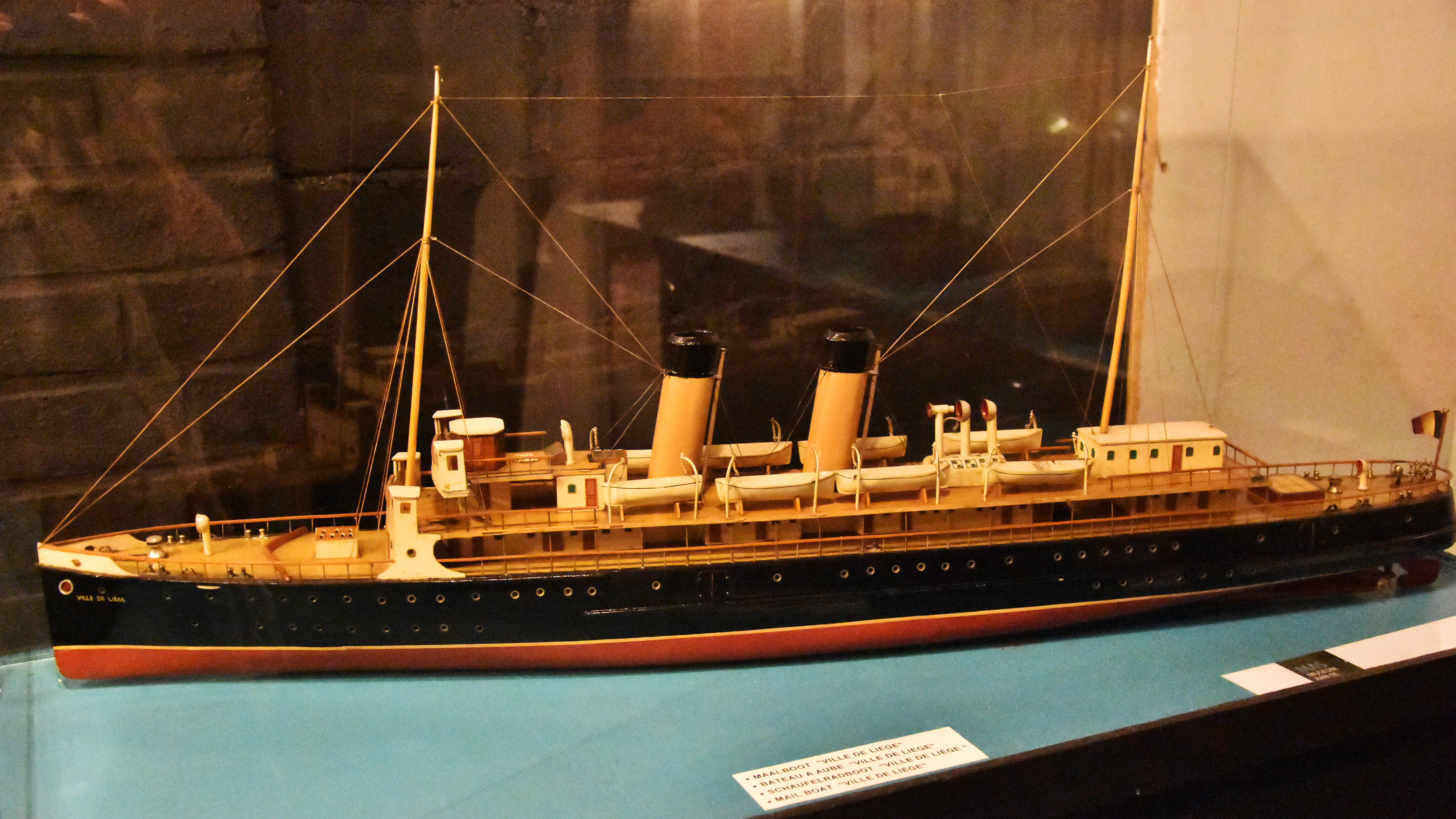 Mailboot Ville de Liège Seafront (Zeebrugge) 25-06-2019